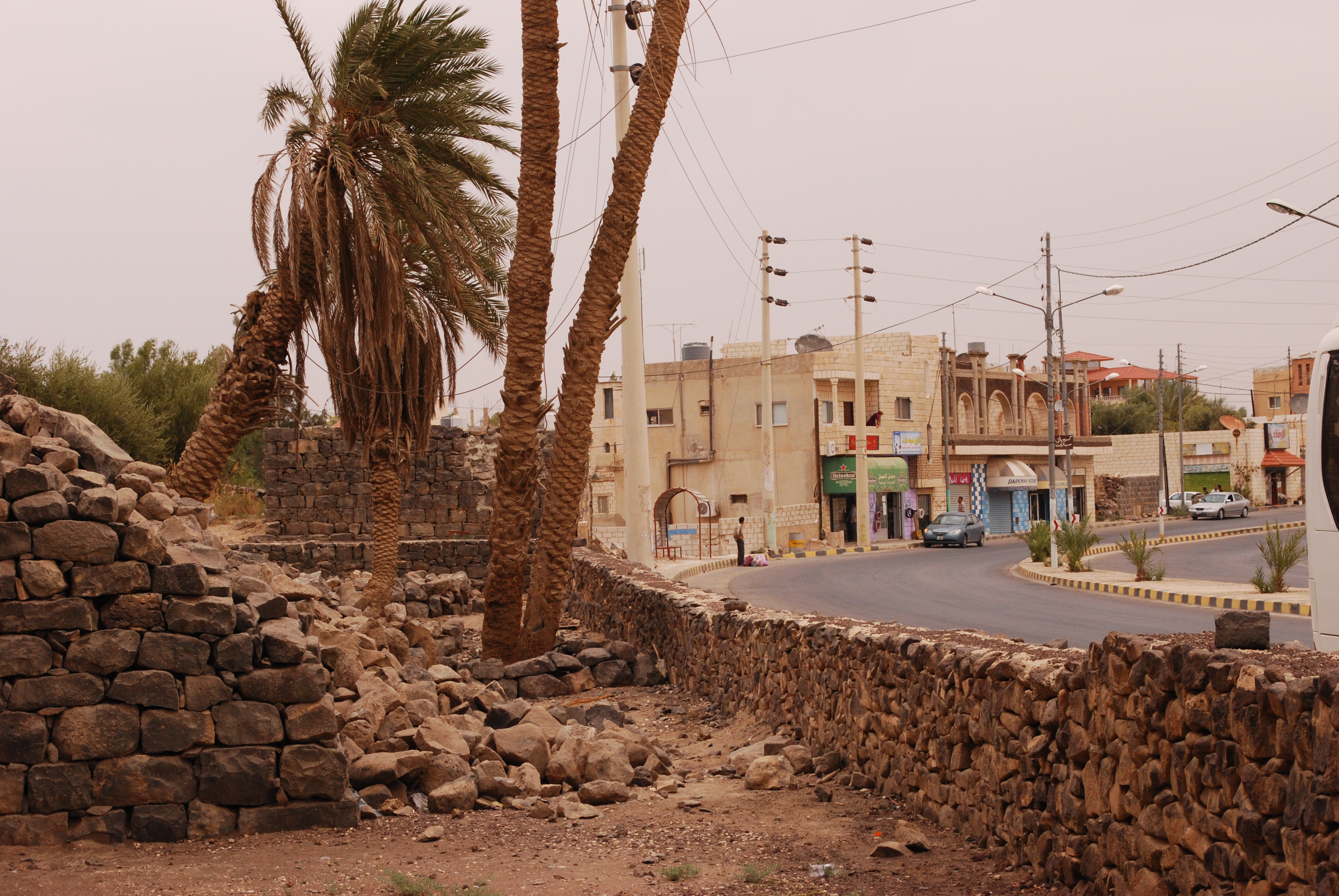 Qasr al Azrak : l'aile sud-est, vue de l'enceinte, vers la route n° 5..